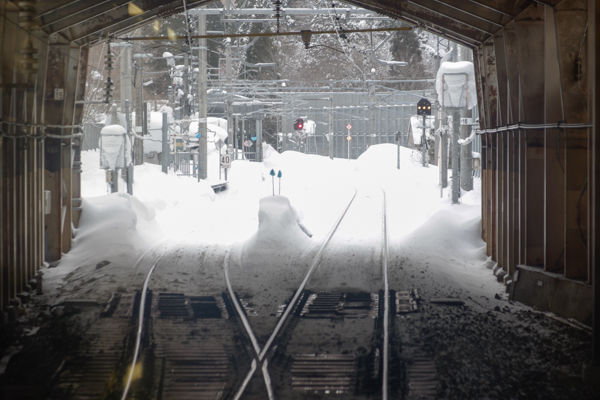 JR田沢湖線 志度内信号場。 下り向き、スノーシェルターから車内より撮影